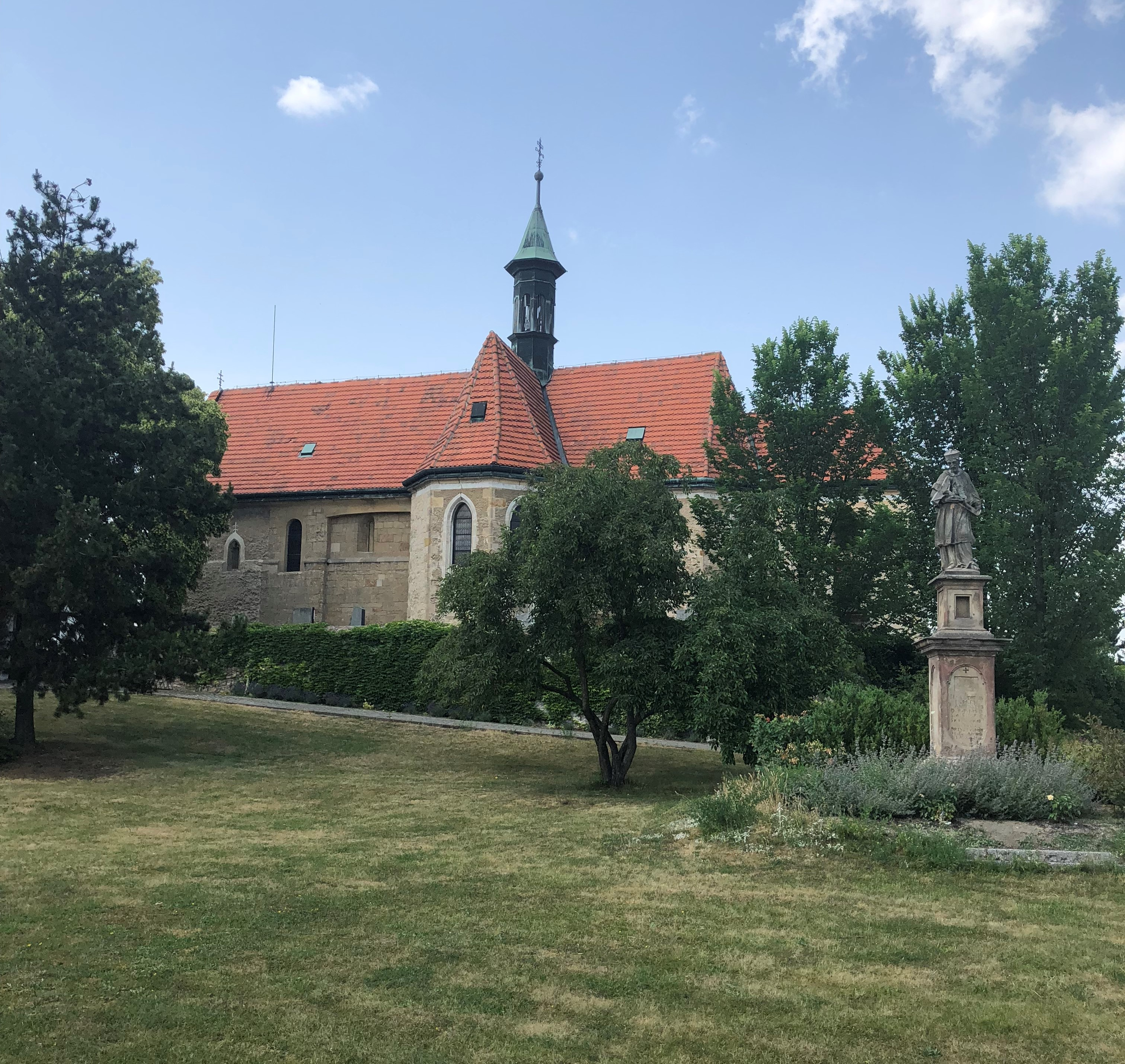 Pohled z náměstí